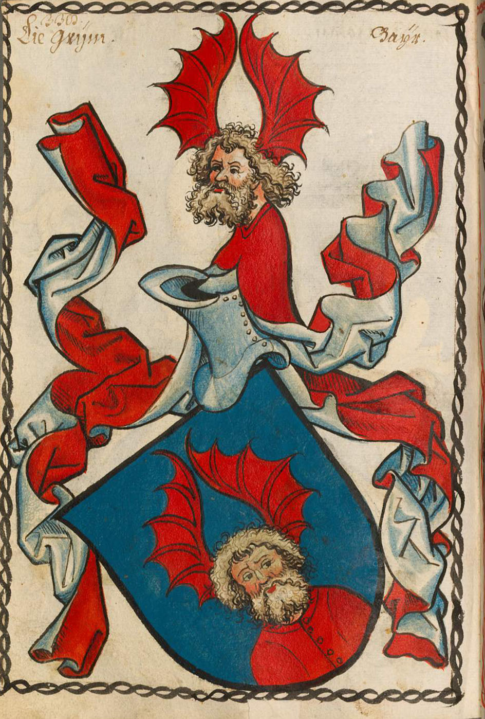 Scheibler'sches Wappenbuch , älterer Teil Bayern Seite 338